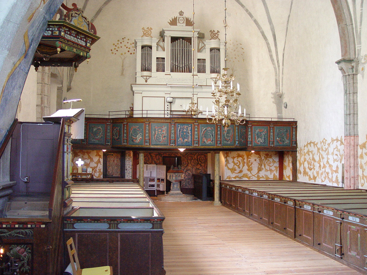 Bro kyrka (Gotland). Orgel von 1839, die älteste auf Gotland